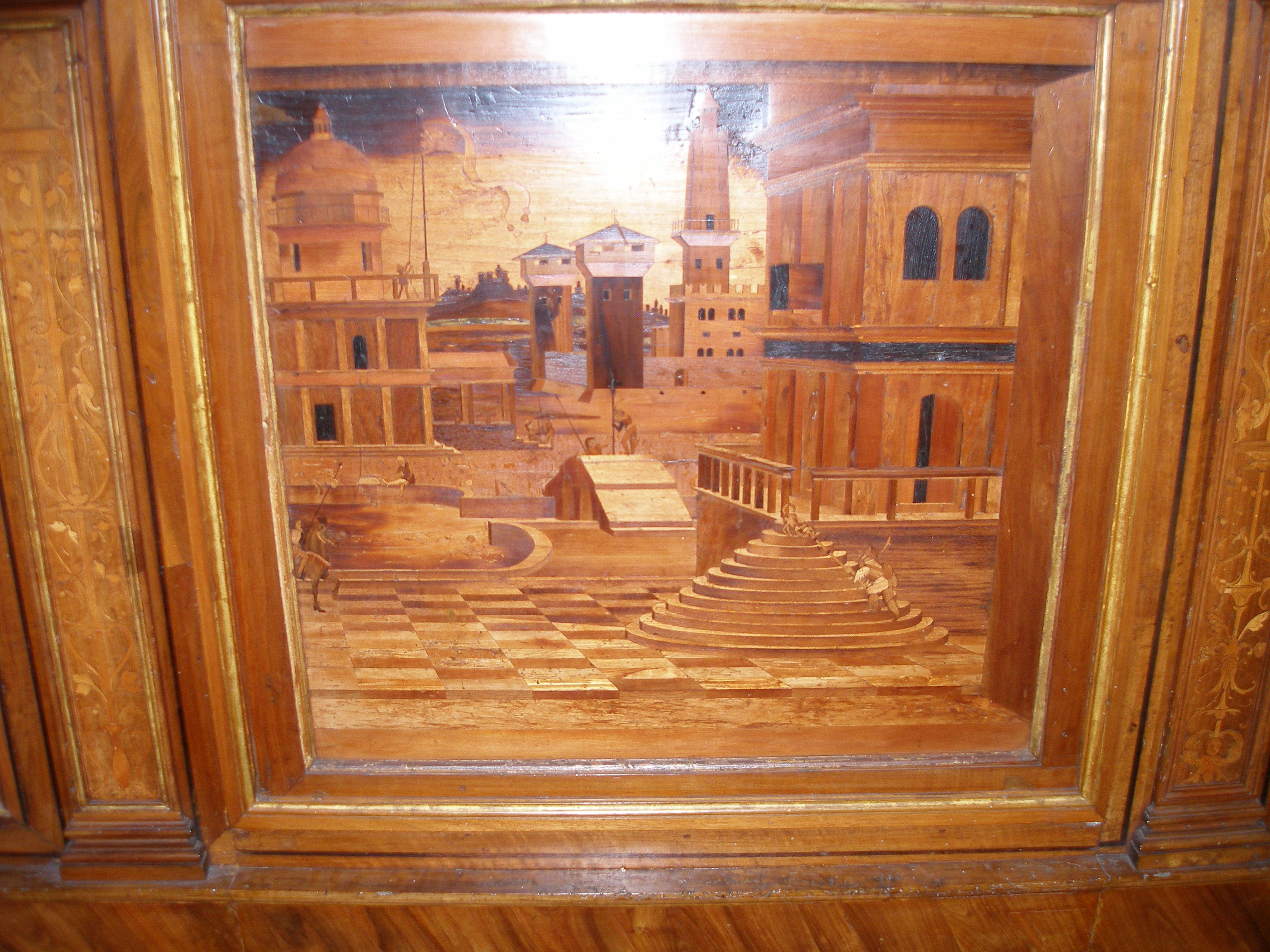 Mantua